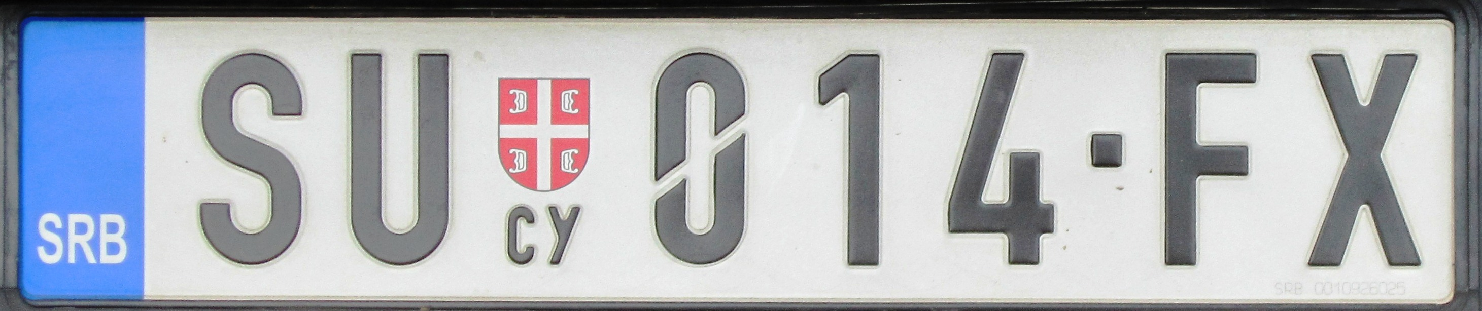 Servië kentekenplaat Subotica